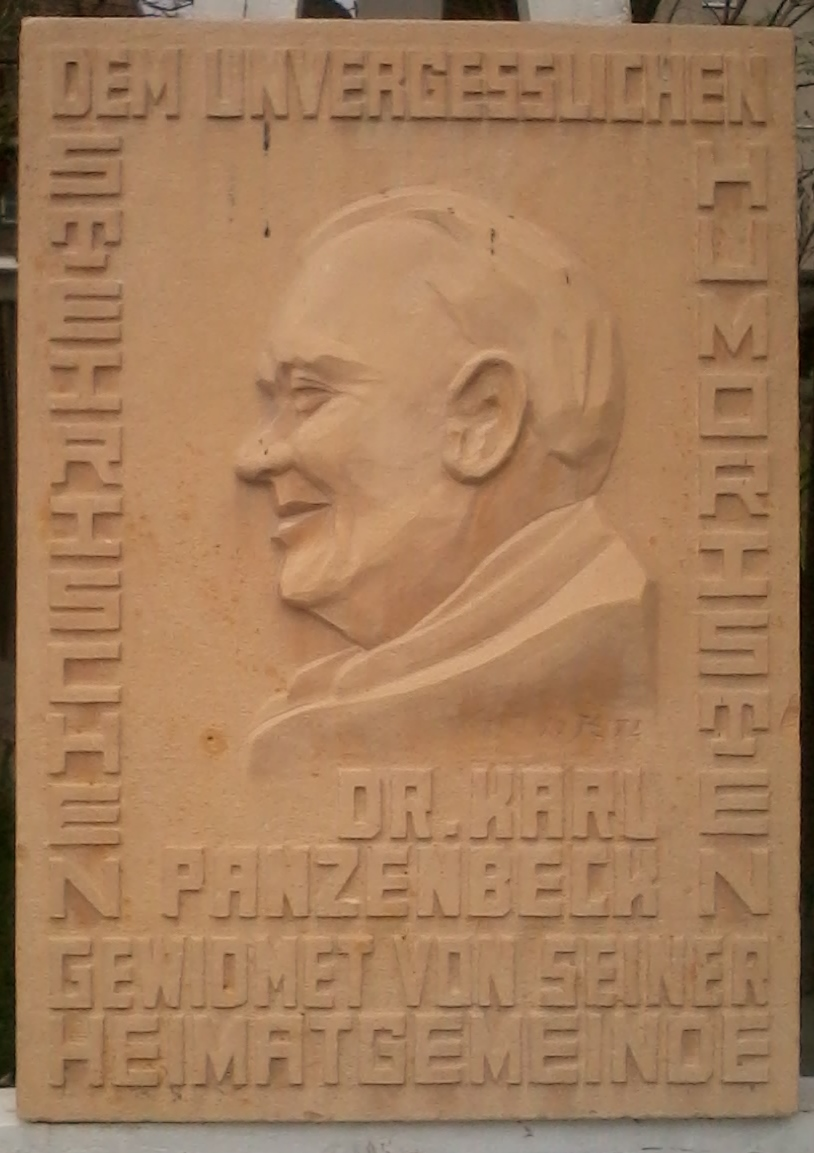 Denkmal für den Schriftsteller und Humoristen Dr. Karl Panzenbeck (1899-1967) in Langenwang.